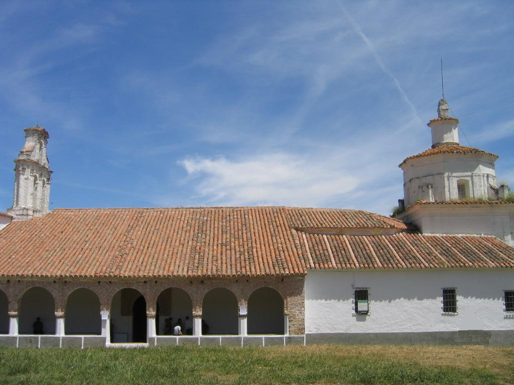 Ermita de Ntra. Sra. del Ara (siglo XV), ubicada en Fuente del Arco (Badajoz).